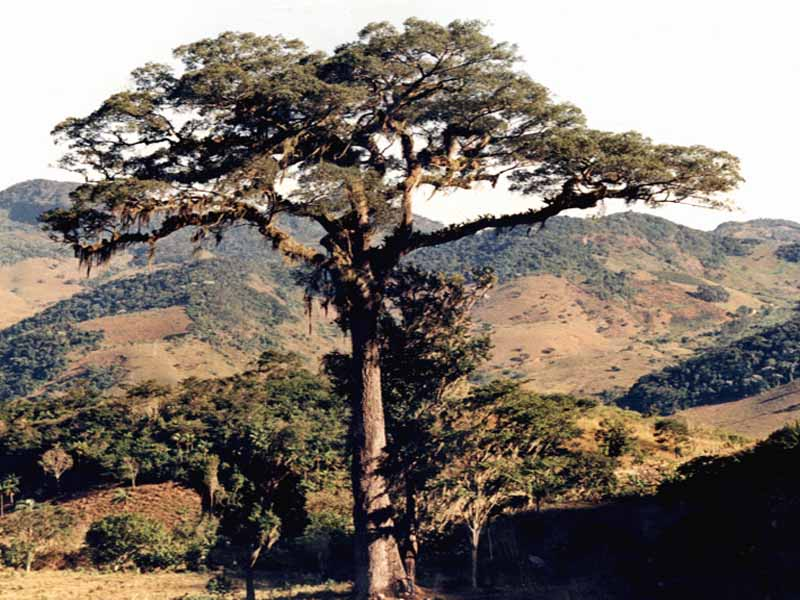 jequitiba milenar em carangola Minas Gerais